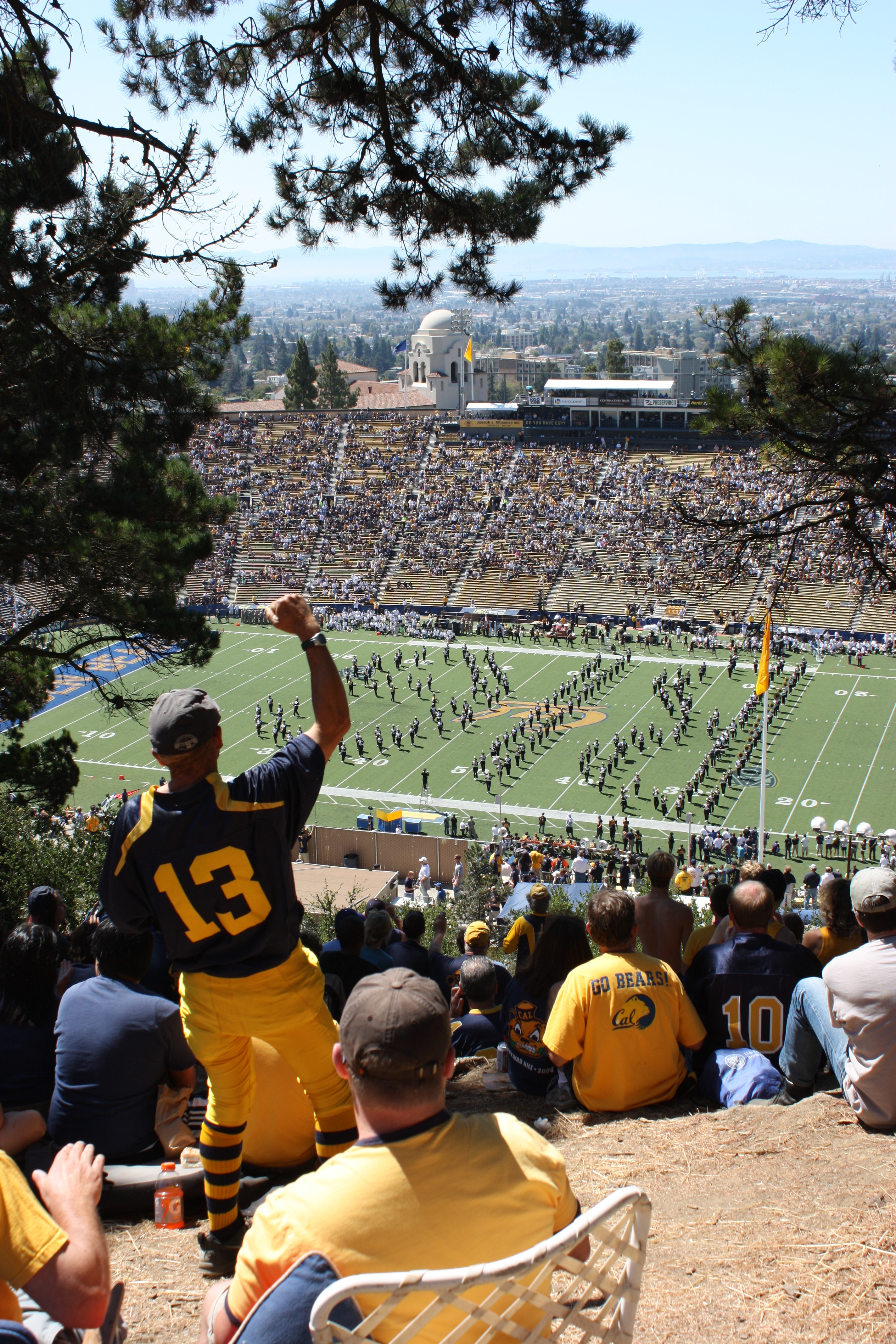 Cal Bears vs. Colorado. 9/11/10